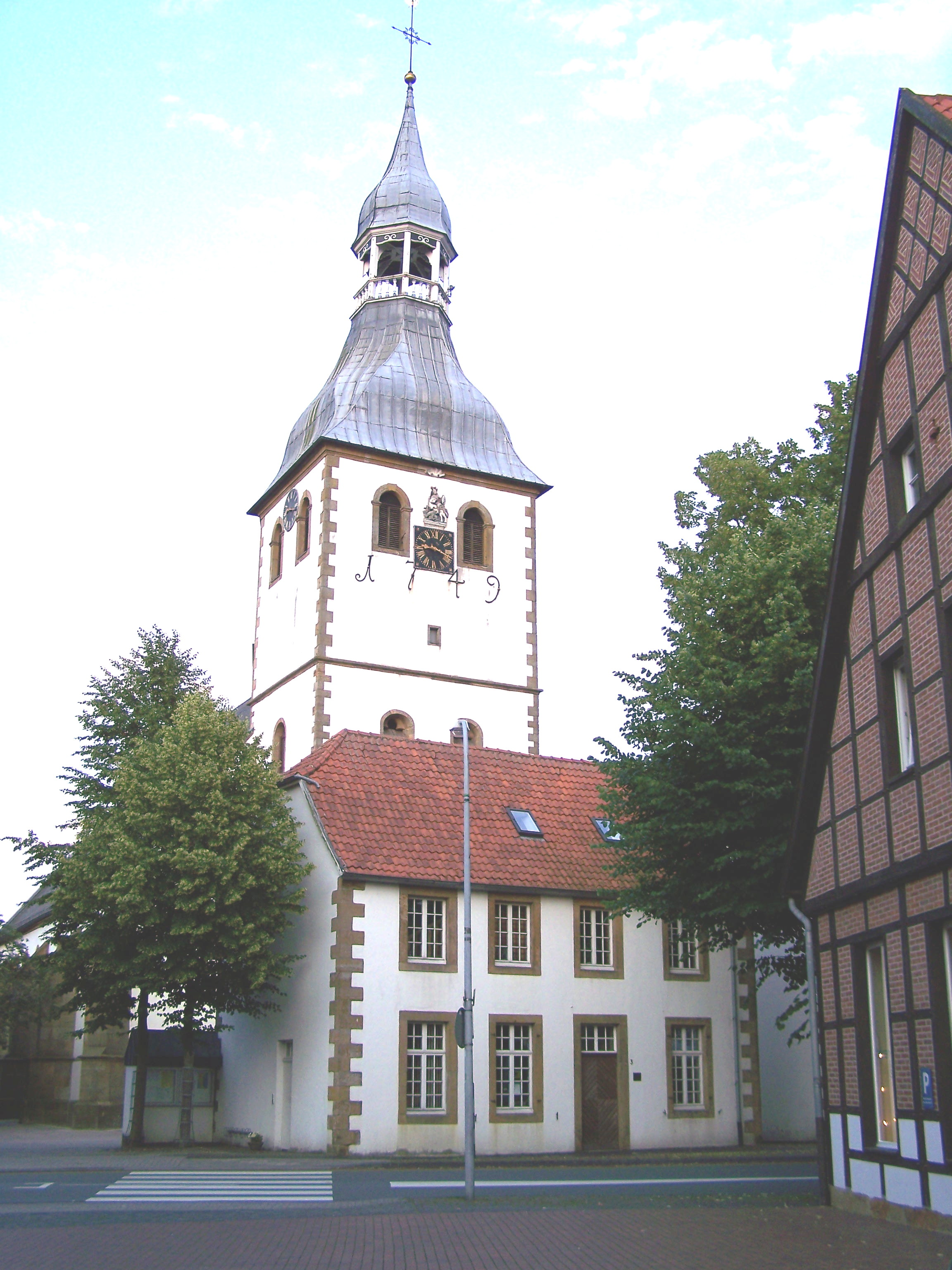 Kath. Kirche Hopsten, davor das Küsterhaus und rechts Töddenhaus Ahrens